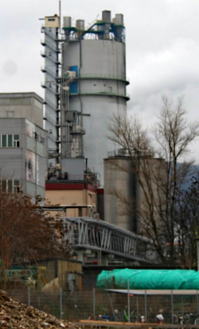 Prillturm einer Harnstoffanlage, Chemiepark Linz